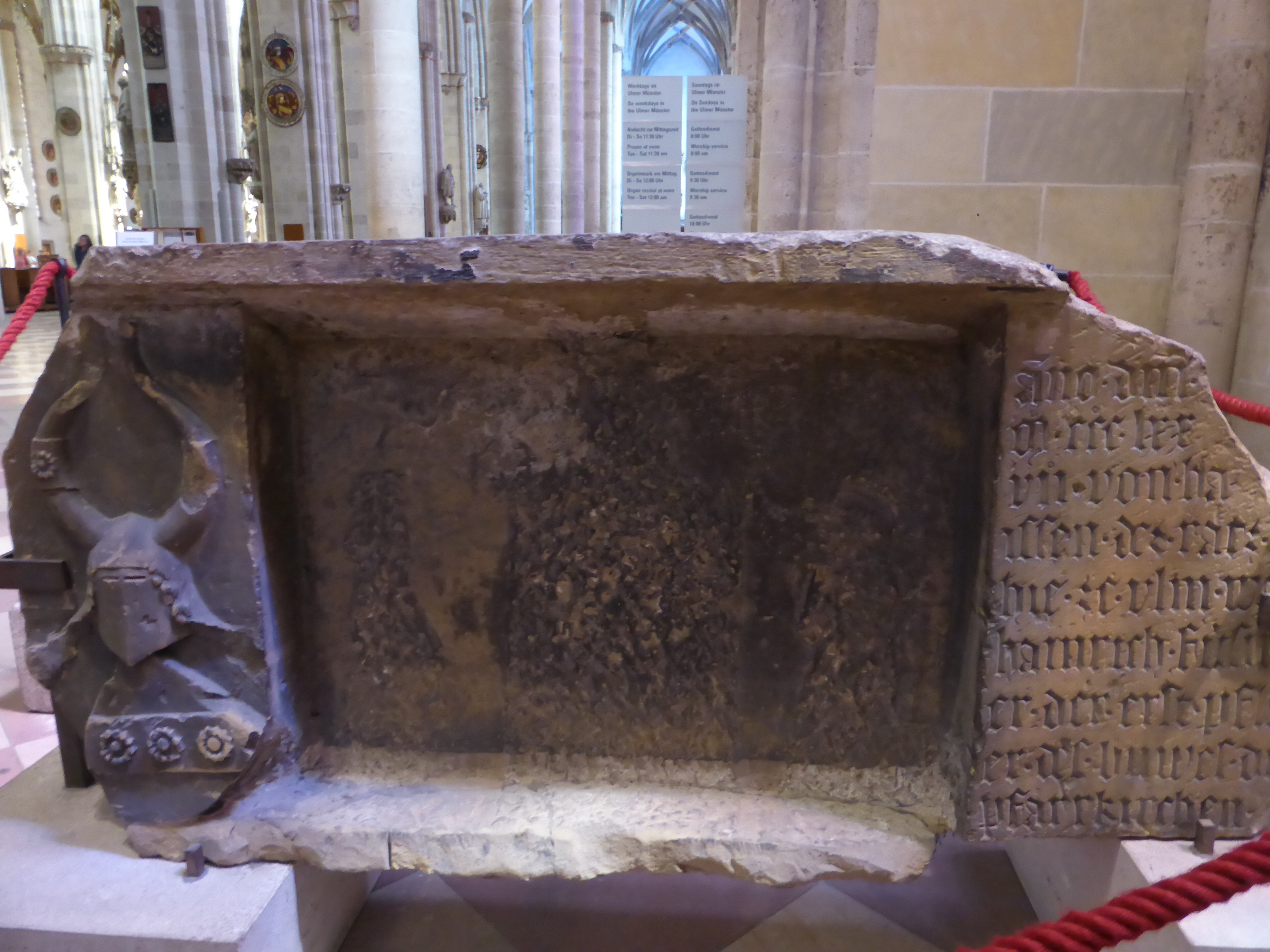 Rückseite eines jüdischen Grabsteins, der im Ulmer Münster verbaut wurde